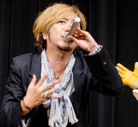 加藤タクヤ2